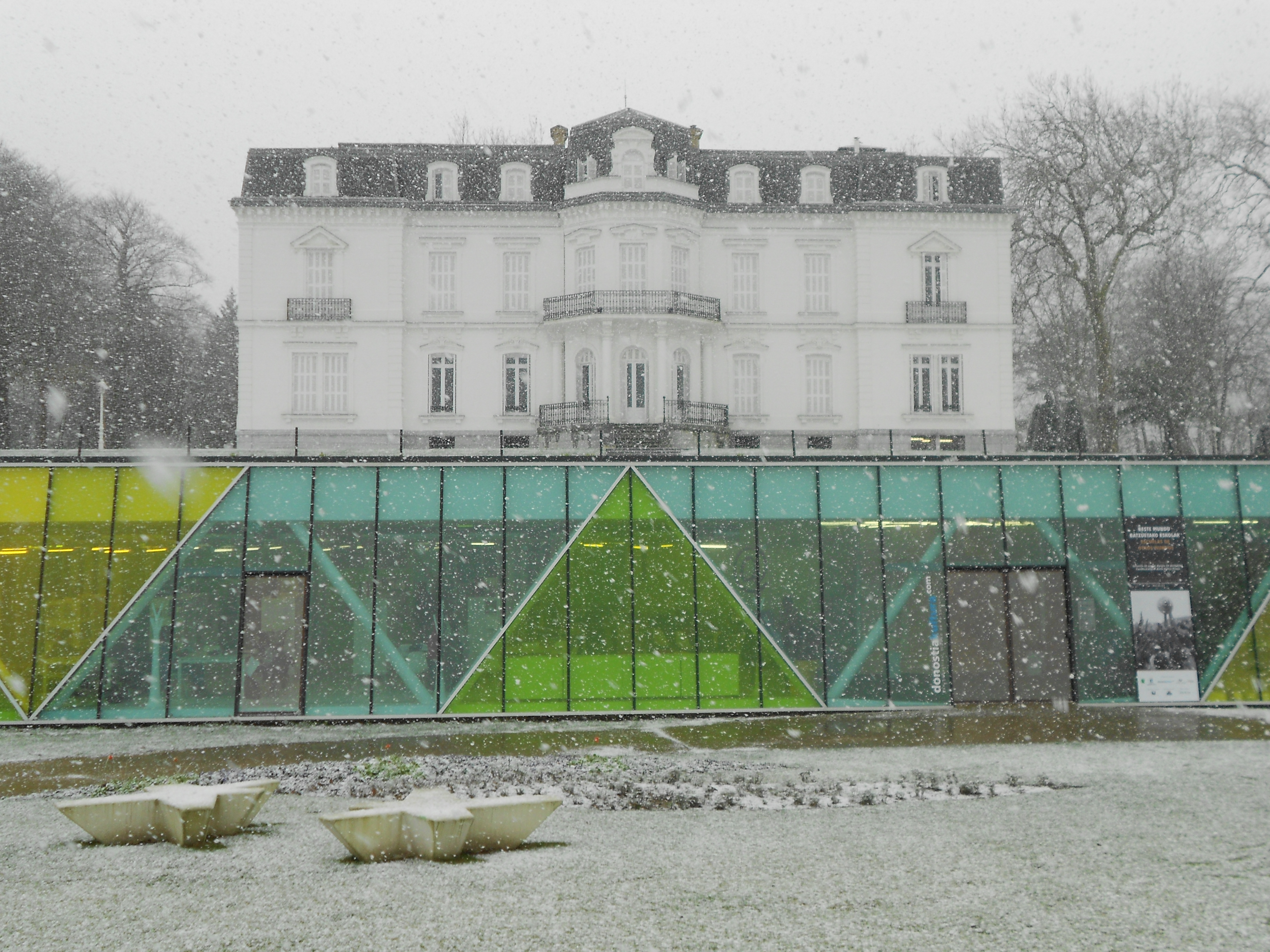 Aiete jauregia elurretan.